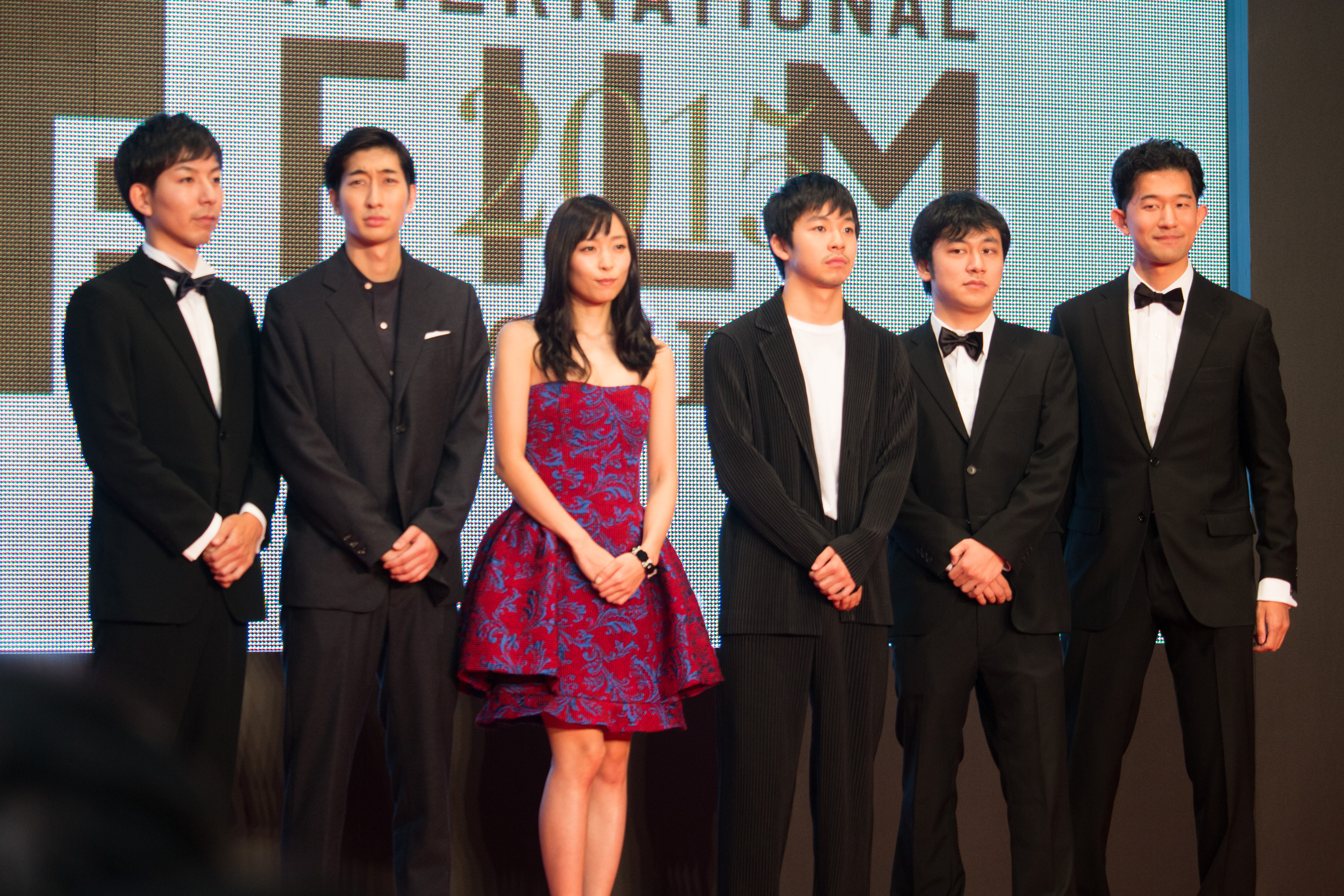 第28回 東京国際映画祭 オープニングセレモニー キャスト クルー (走れ、絶望に追いつかれない速さで)